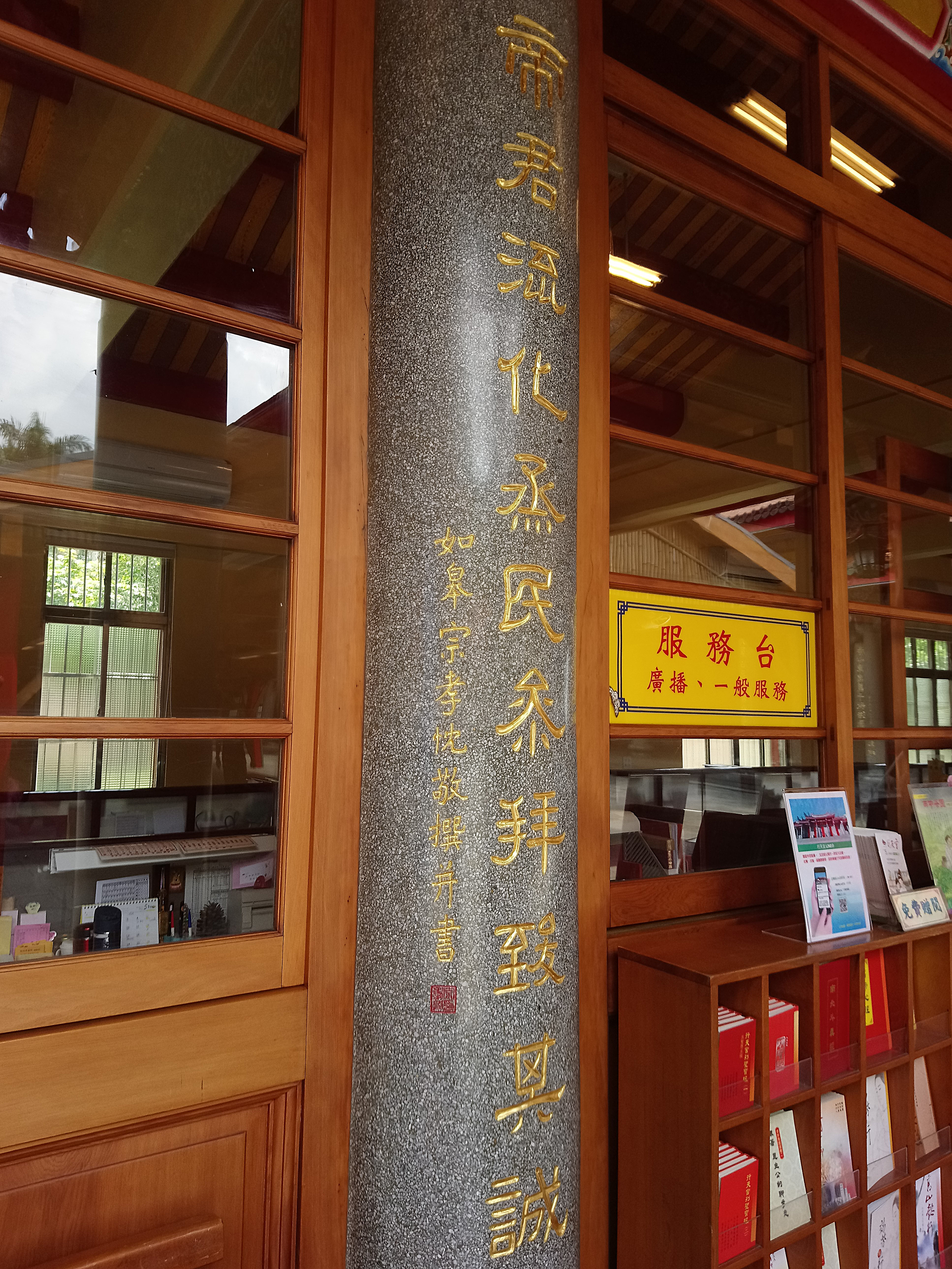 三峽行修宮內宗孝忱敬撰并書「帝君流化蒸民忝拜致其誠」楹聯,新北市三峽區嘉添里